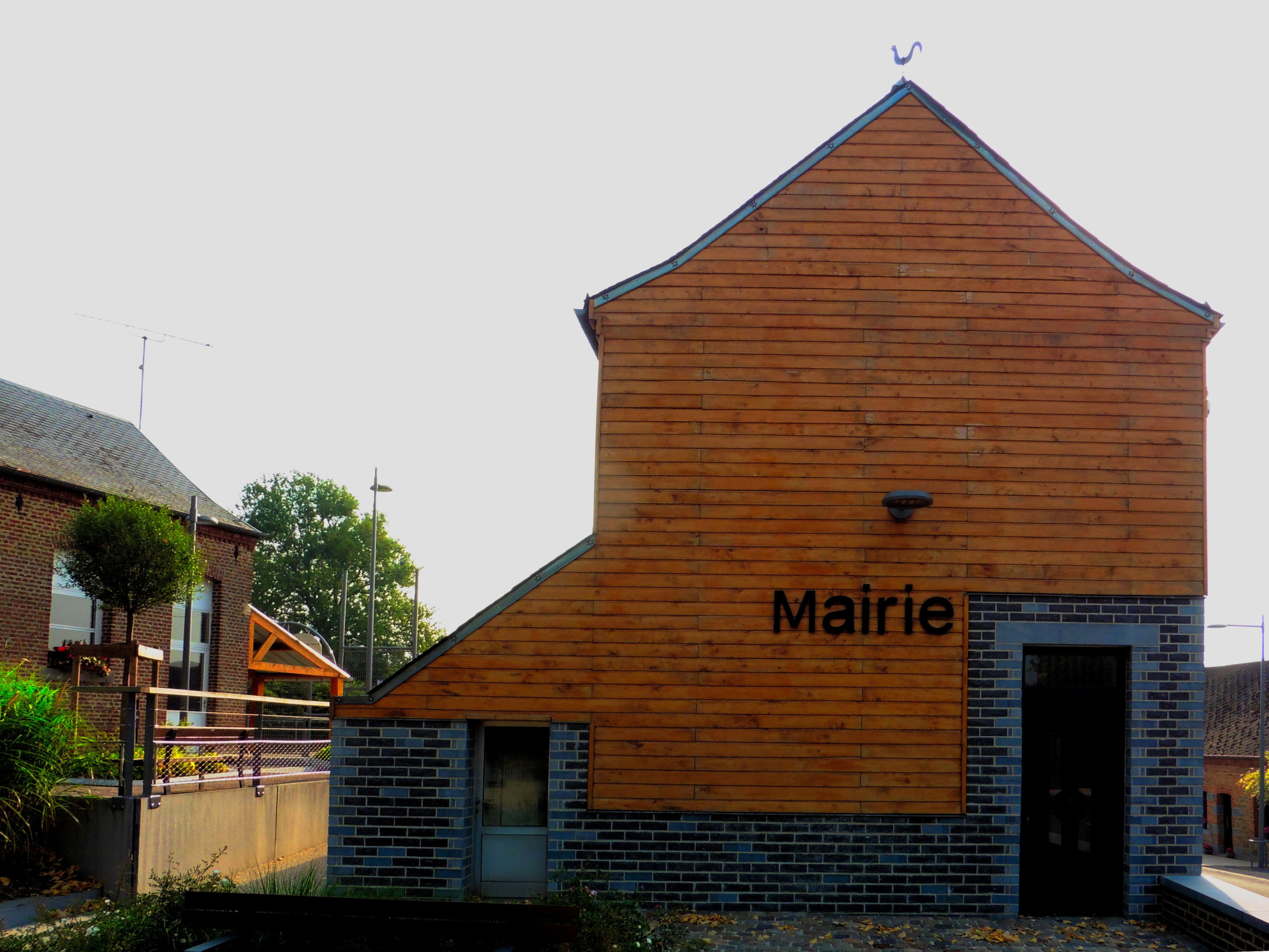 La Mairie Willies Nord.- France.